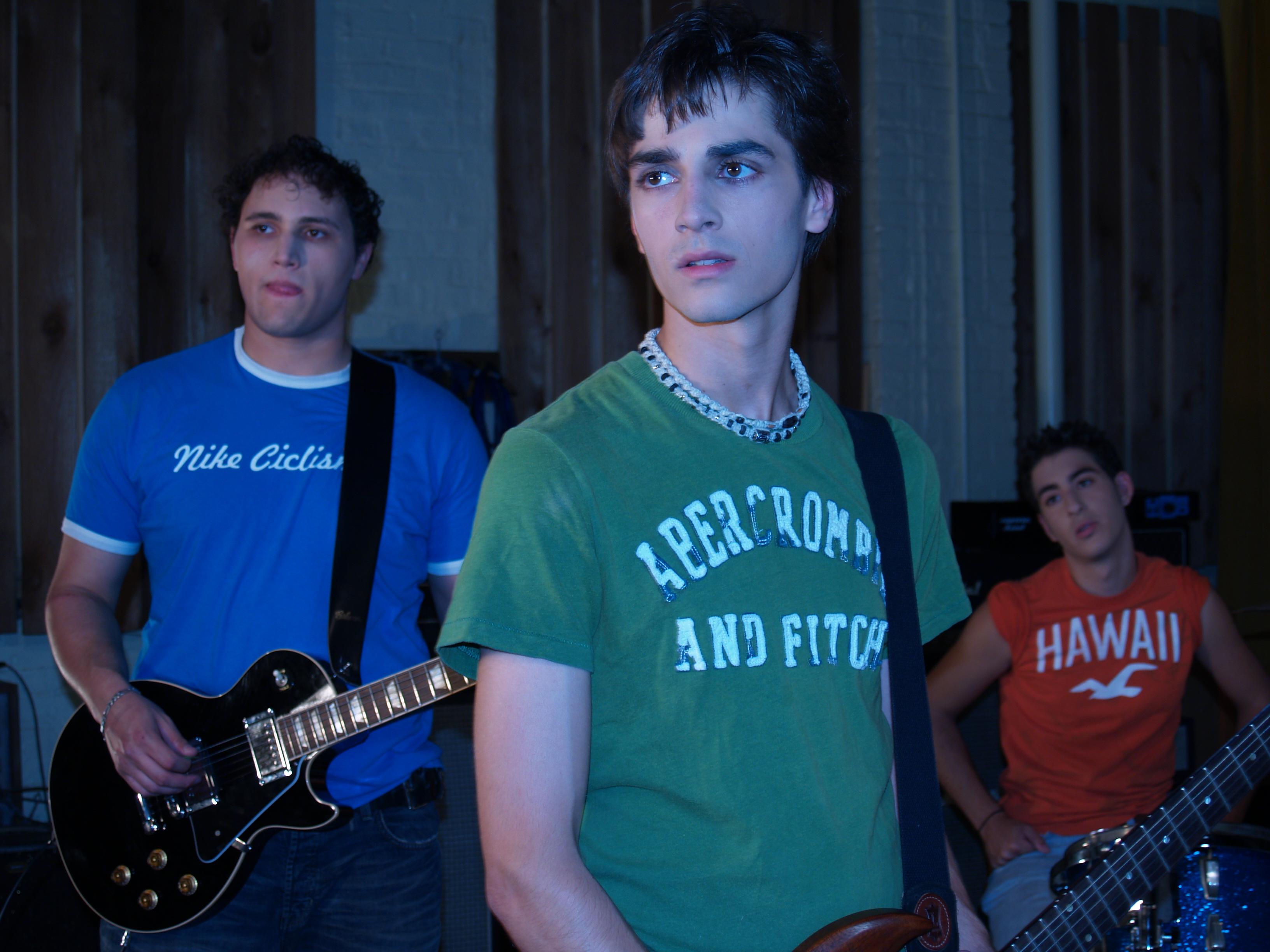 Point Valid Trio